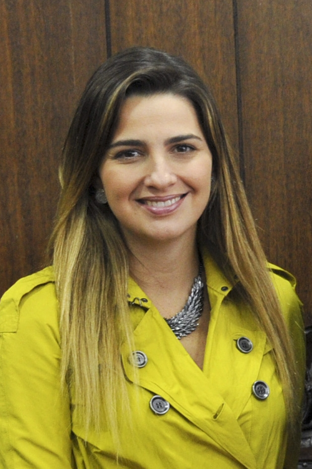 Presidente do Senado, Renan Calheiros (PMDB-AL) recebe a visita da prefeita de Campos dos Goytacazes (RJ), Rosinha Garotinho (PR), acompanhada da deputada federal, Clarissa Garotinho (PR-RJ). (E/D): prefeita de Campos dos Goytacazes (RJ), Rosinha Garotinho (PR); presidente do Senado, Renan Calheiros (PMDB-AL); deputada, Clarissa Garotinho (PR-RJ); senador Romero Jucá (PMDB-RR). Foto: Jane de Araújo/Agência Senado.